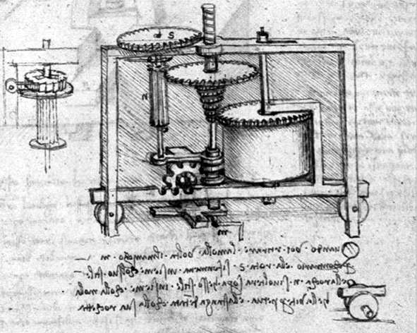 Figure II-42. Ressort à tension diminuante compensée. Leonardo da Vinci, Codex Madrid (1490 et1499), livre 1 p. 13.